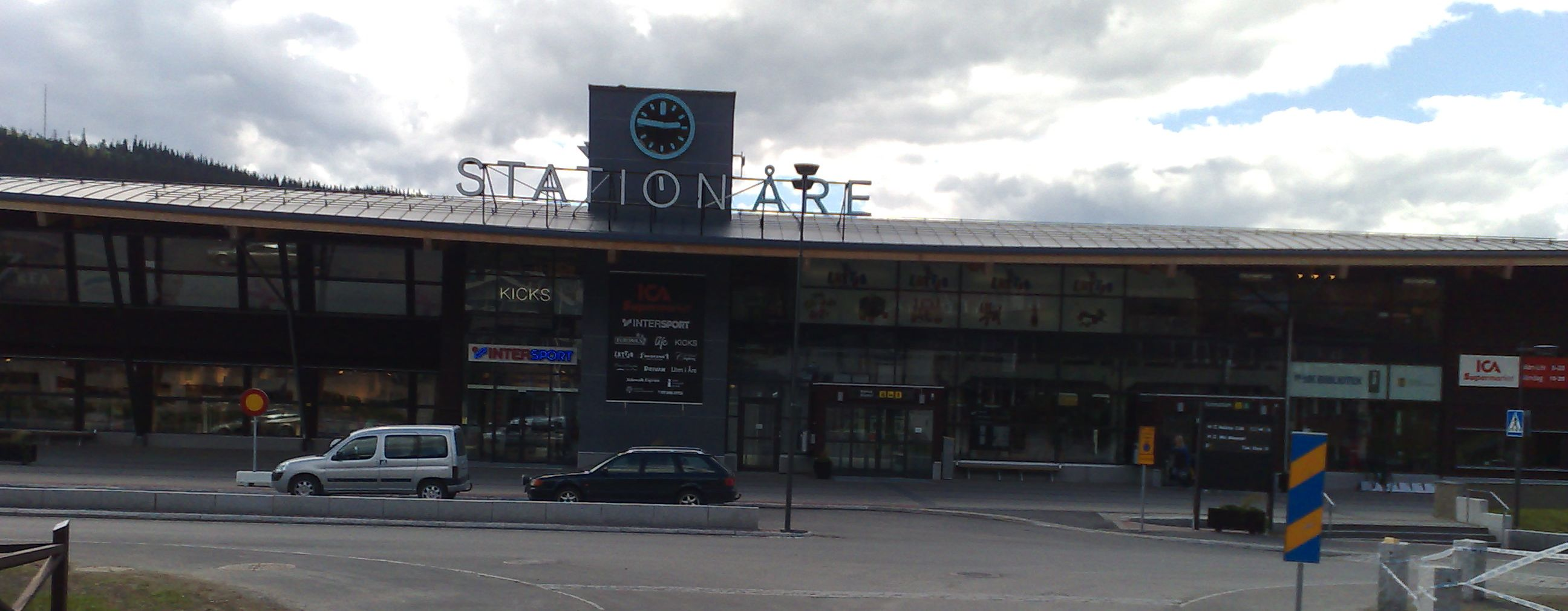 Åre järnvägsstation